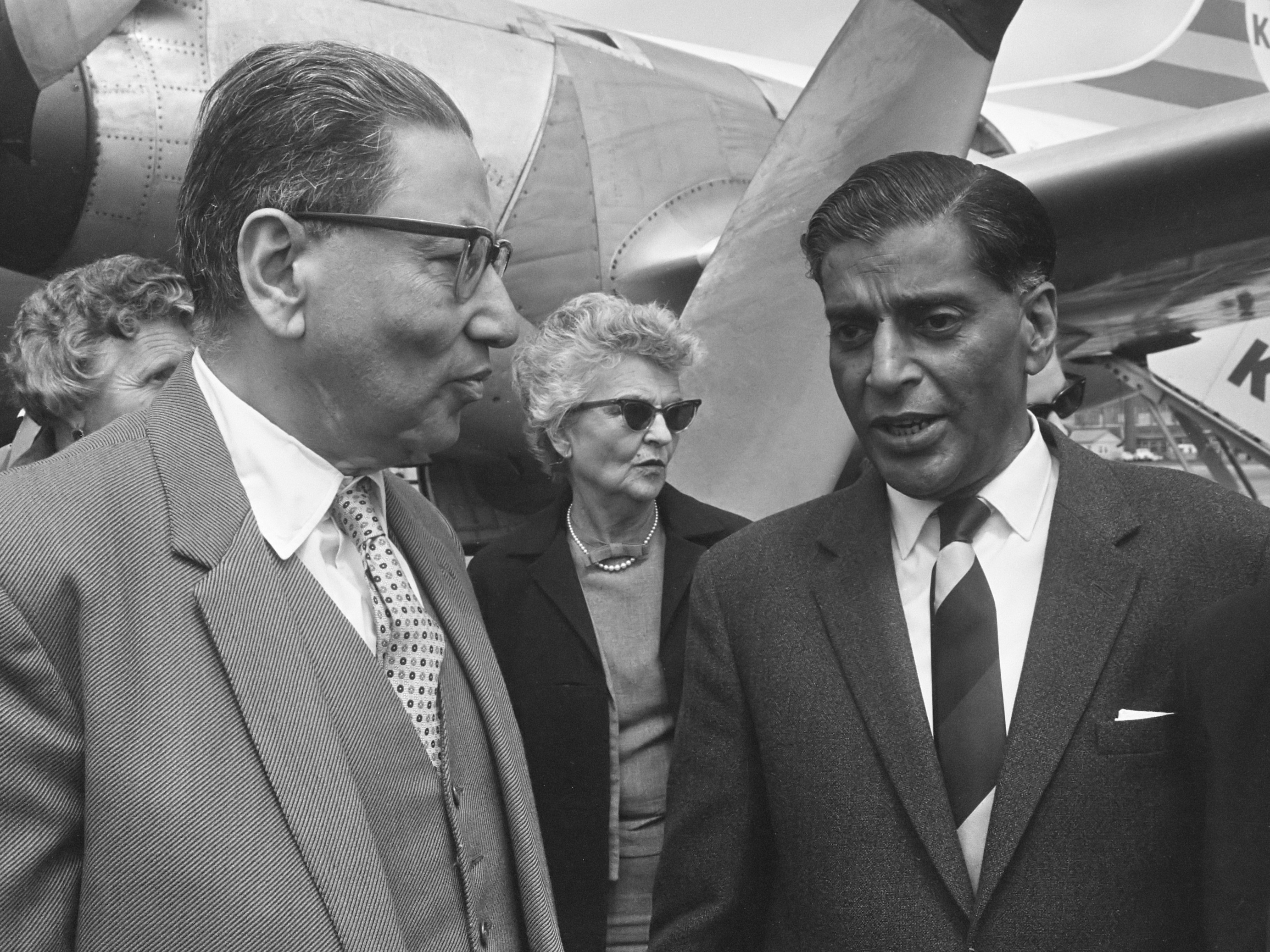 Aankomst Indiase Minister van Financien , Zijne Excellentie Sachandra Chandhuri (links) en Indiase ambassadeur Zijne Excellentie Rajkumar Raghunath Sinha 30 juni 1966